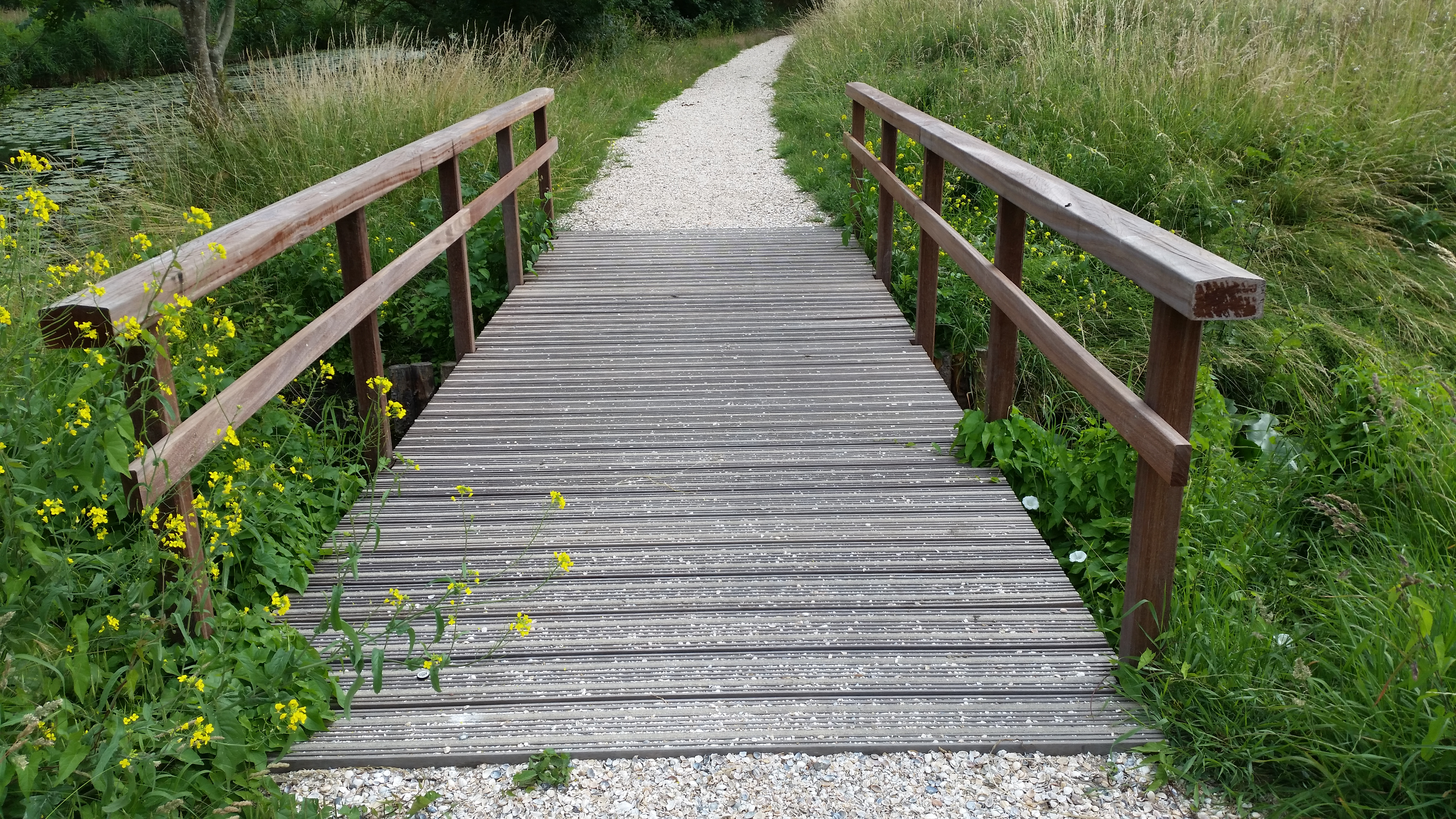 Overzichtsfoto van Brug 2396 (in Amsterdam)